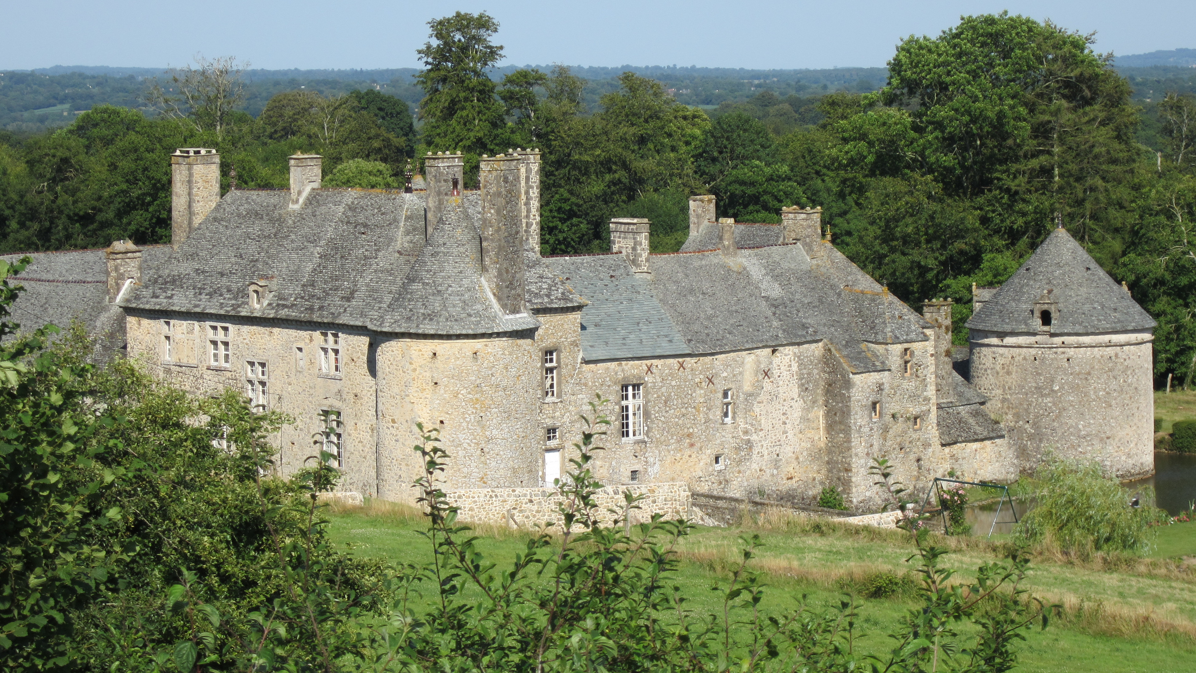 Manoir de la Cour de Saint-Martin-le-Hébert, Manche 16e /18e siècle .